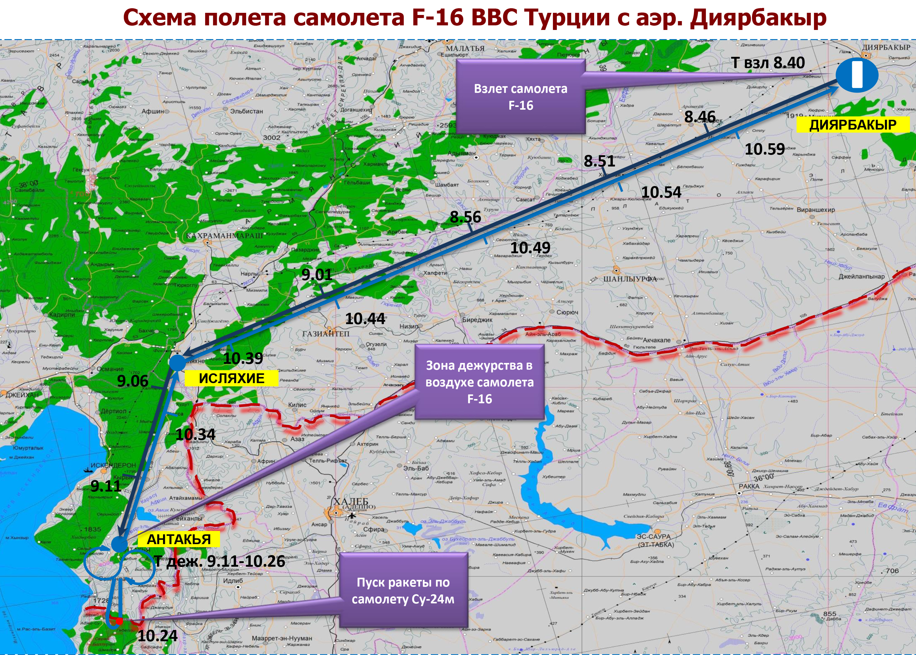 Схема полёта самолёта F-16 ВВС Турции с аэродрома Диярбакыр 24 ноября 2015 года